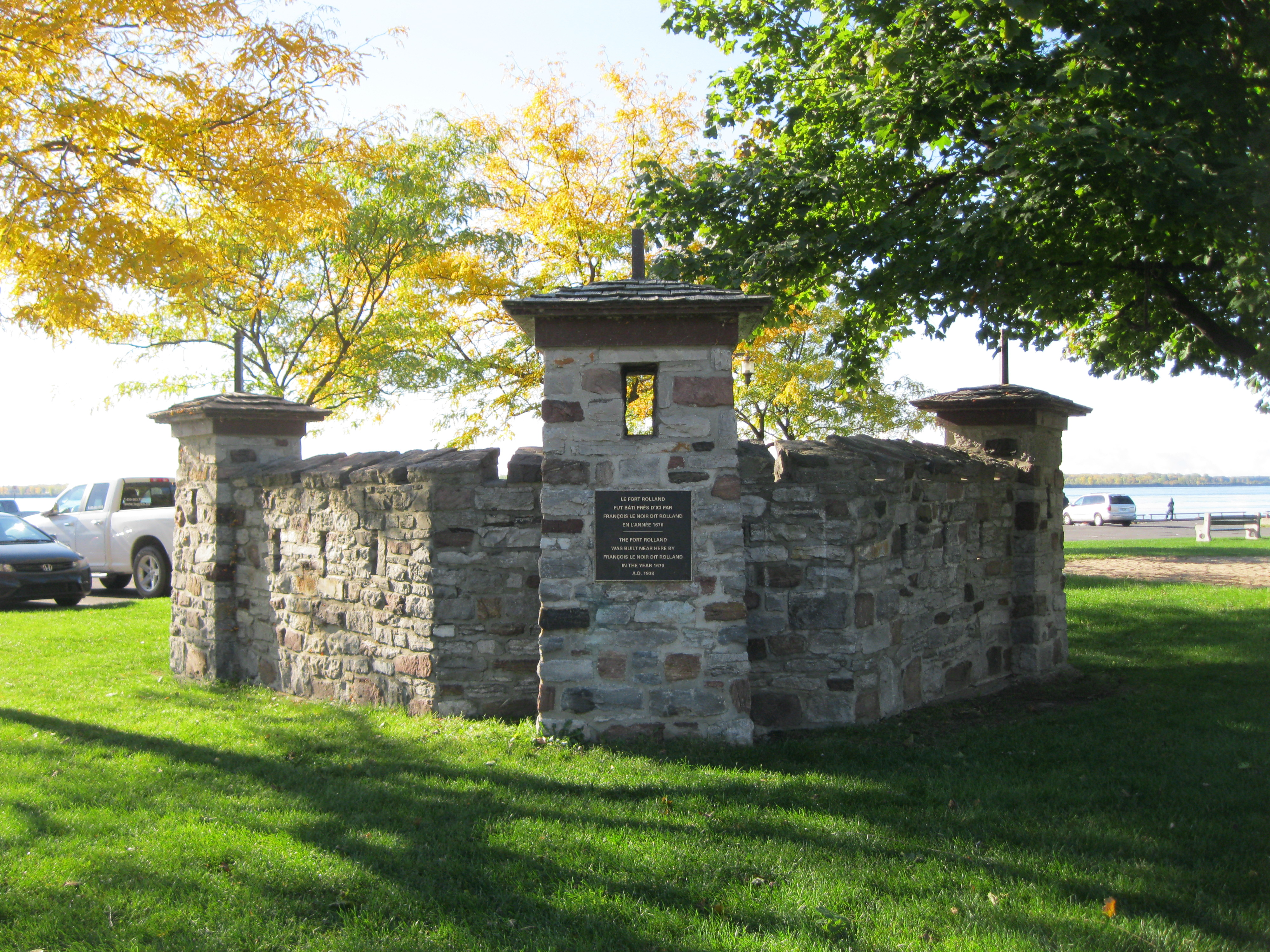 Monument du Fort-Rolland, parc Saint-Louis, Lachine